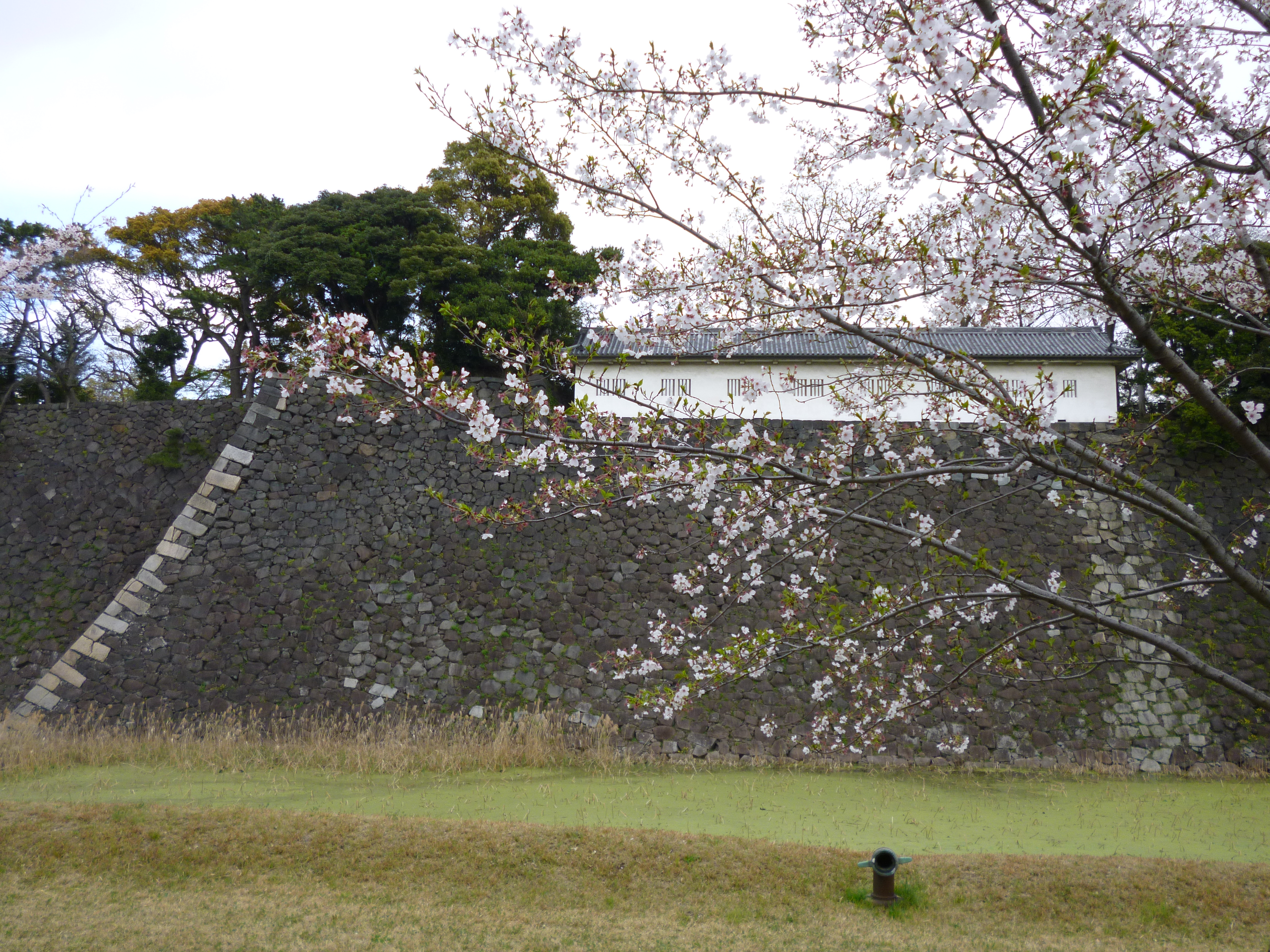 富士見多聞、2014年4月の乾通り公開の際に撮影。